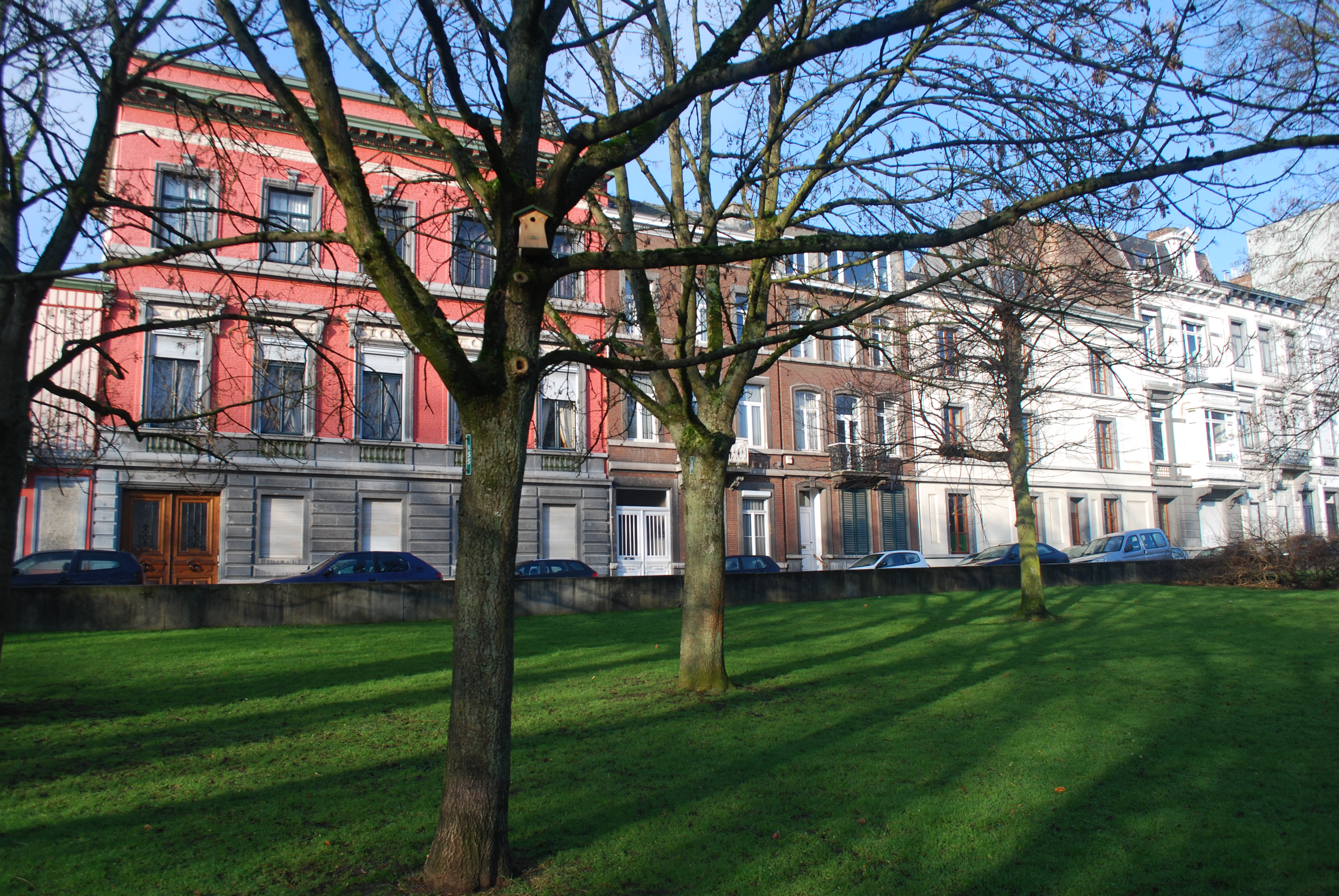 Vue du quartier du Jardin botanique à Liège.